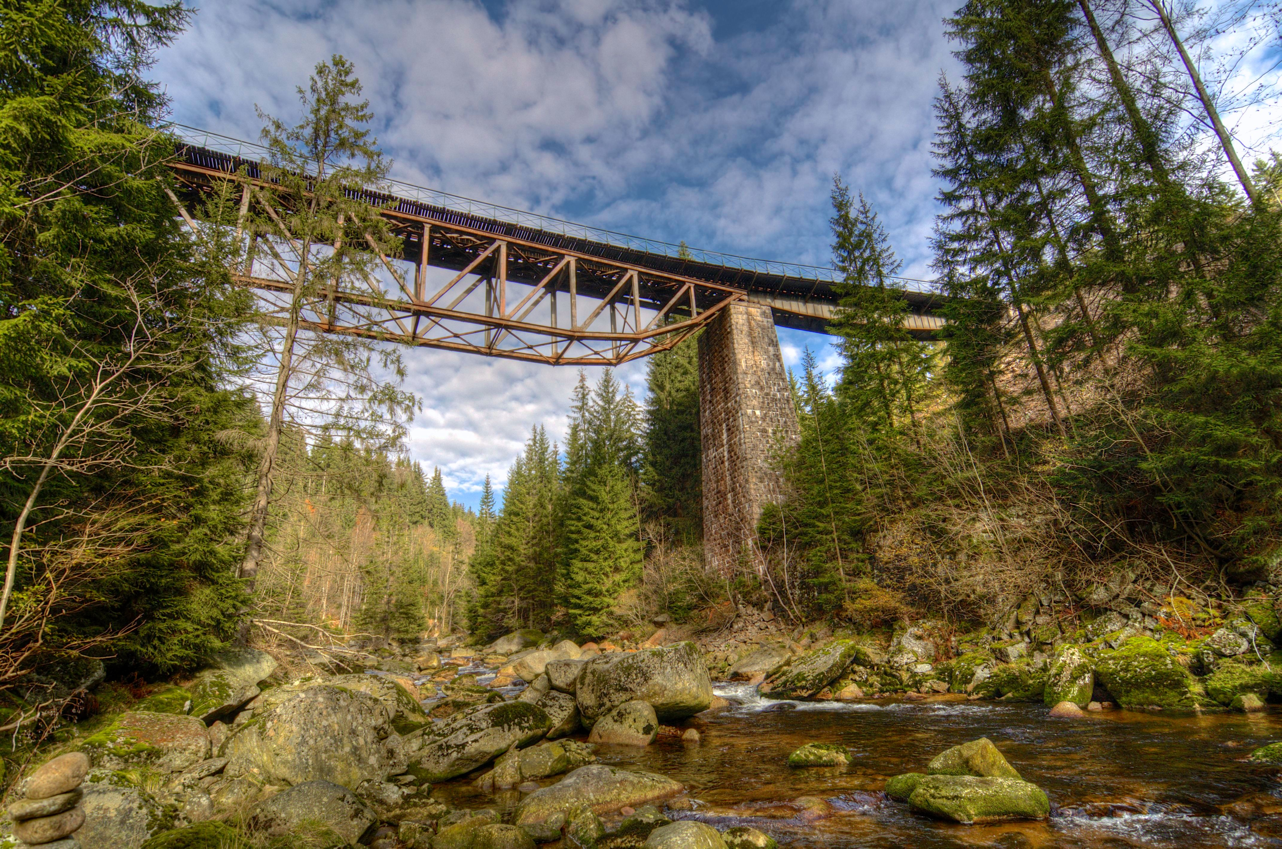 Ozubnicová železniční trať Tanvald - Kořenov, k. ú. Desná I, Desná II, Desná III, Polubný, Šumburk nad Desnou, Tanvald, Horní Kořenov.